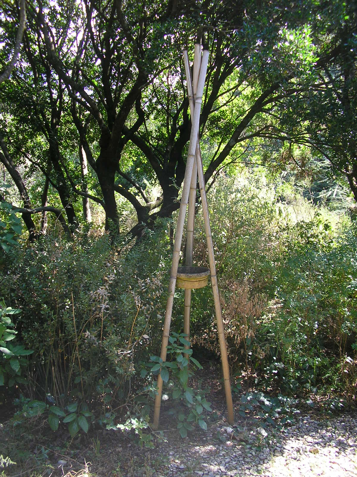 Harmas de Fabre à Sérignan